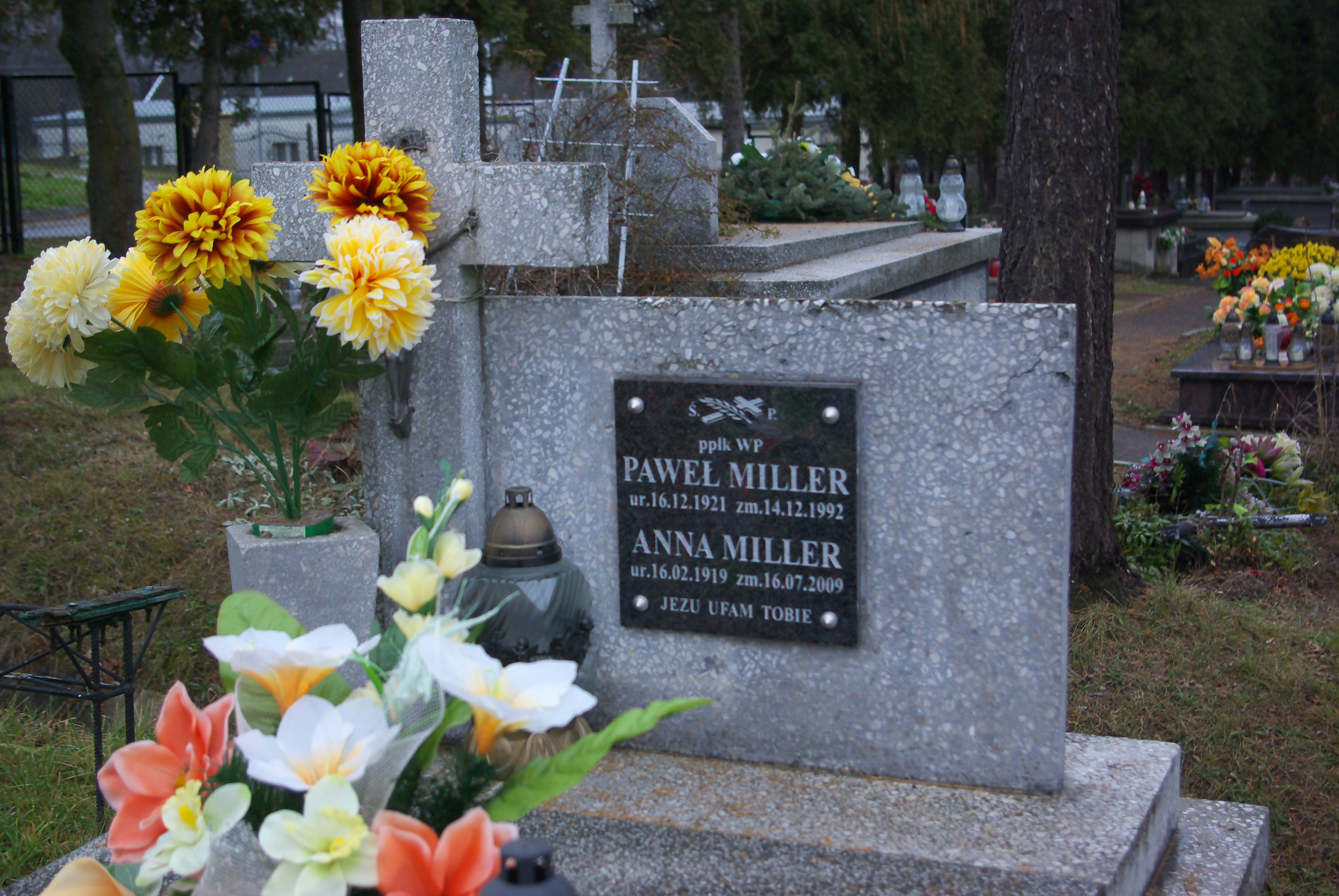 Grobowiec Anny i Pawła Millerów na Cmentarzu Centralnym w Sanoku